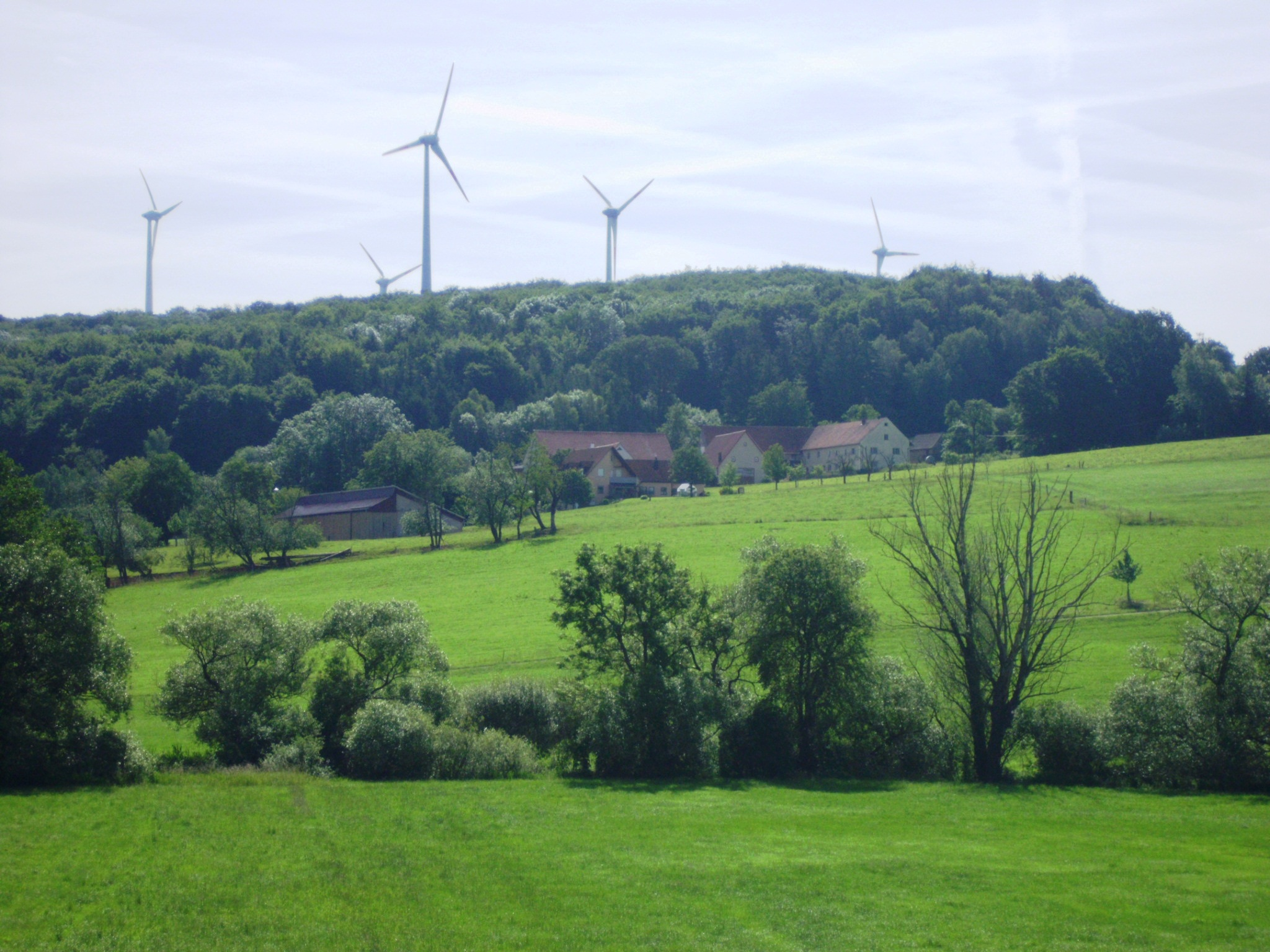 Mariabrunn, Ortsteil des Marktes Heidenheim im mittelfränkischen Landkreis Weißenburg-Gunzenhausen